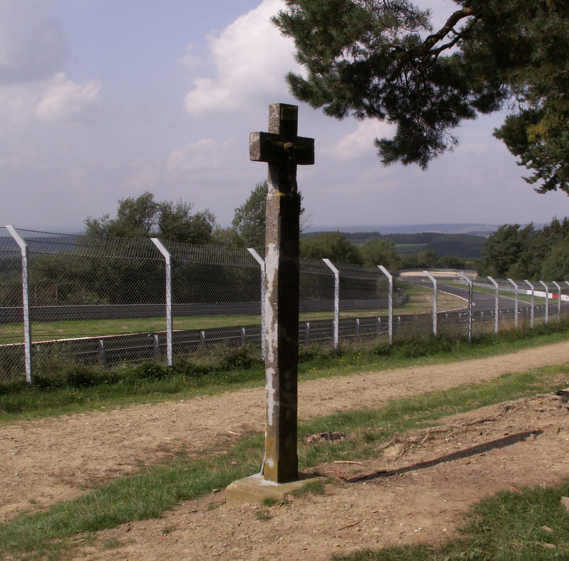 Schwedenkreuz at racing circuit Nürburgring-Nordschleife, Germany